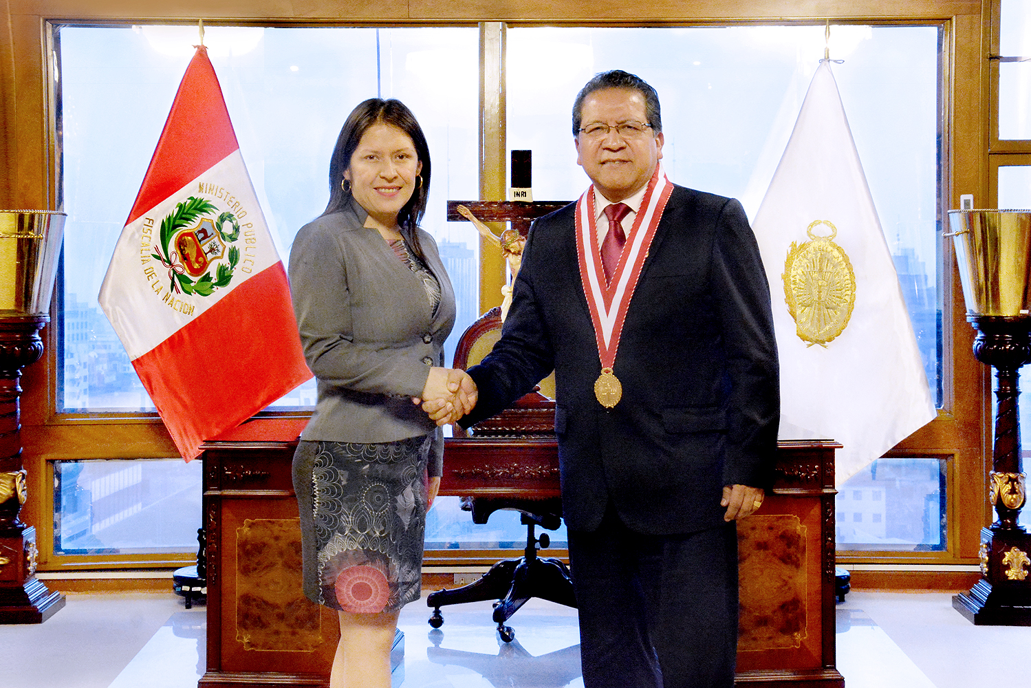 Fiscal de la Nación Pablo Sánchez recibe visita protocolar de la congresista Yeni Vilcatoma.